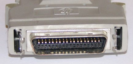 Centronics 0.05" male.